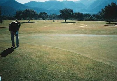 Puttning från foregreen på Lauro golfklubb i Spanien.